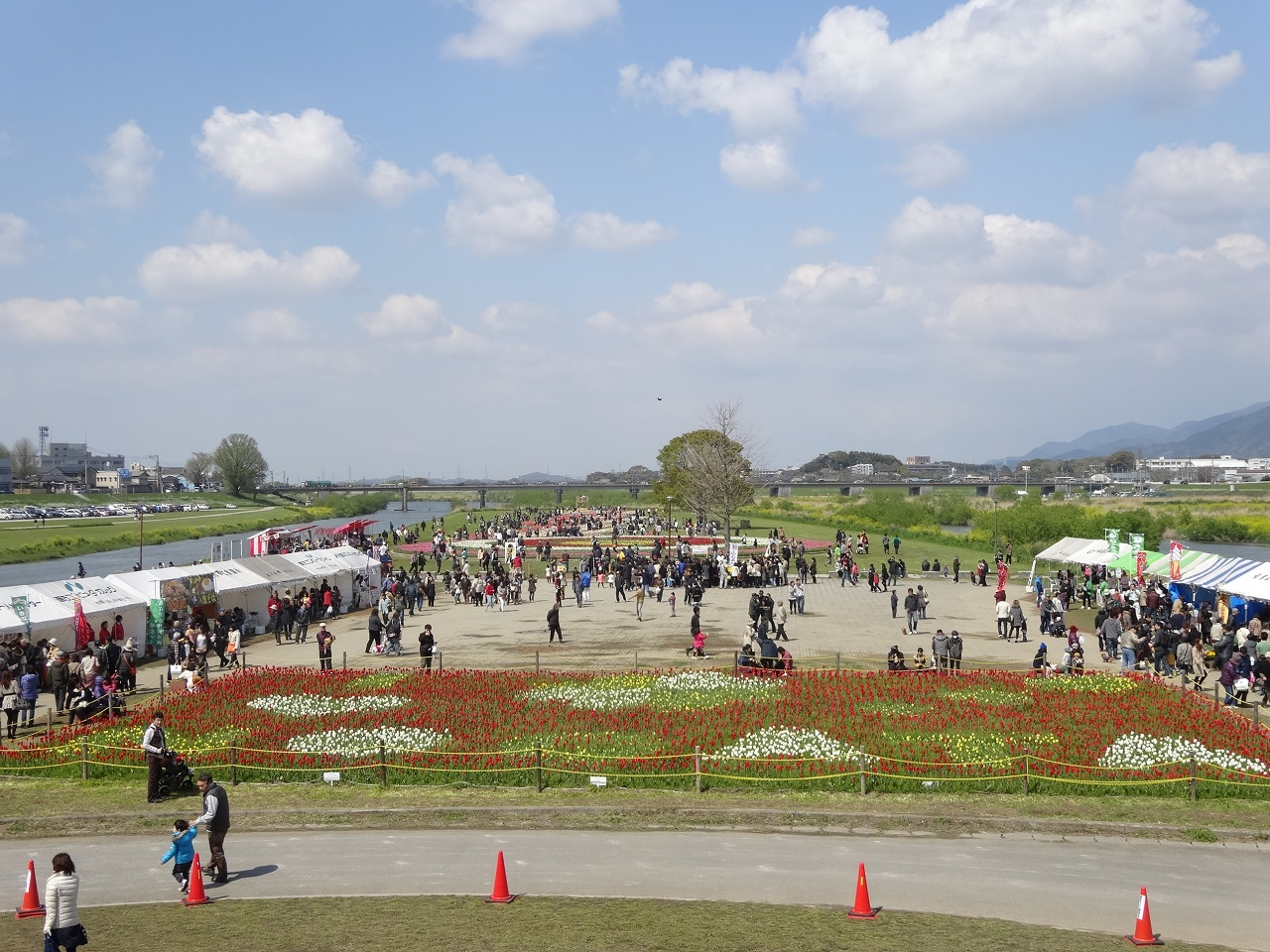 2014年、直方チューリップフェアにて撮影。